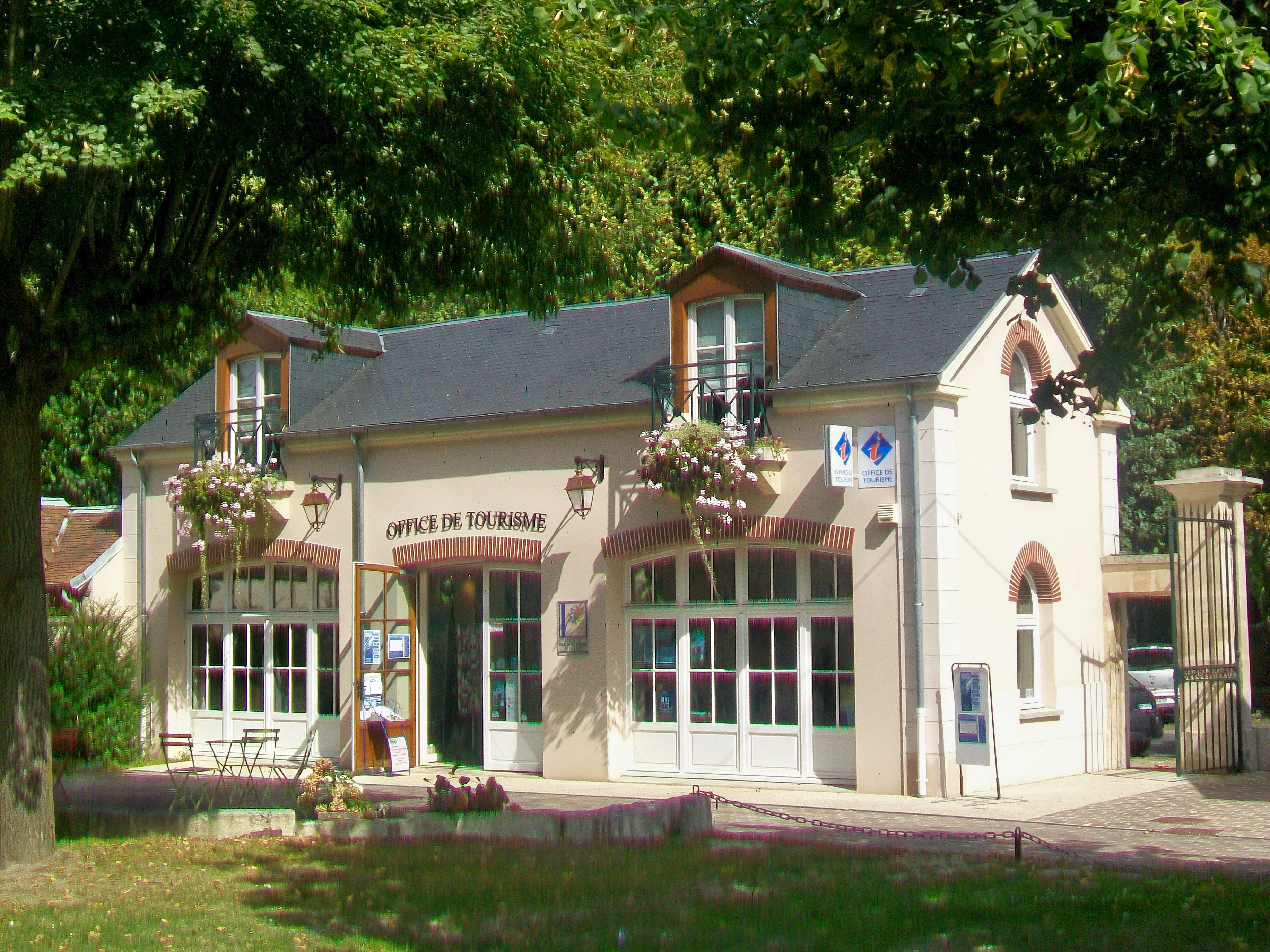 L'office de tourisme, derrière le centre d'art Jacques-Henri Lartigue, Grande-rue et rue des Écuries.